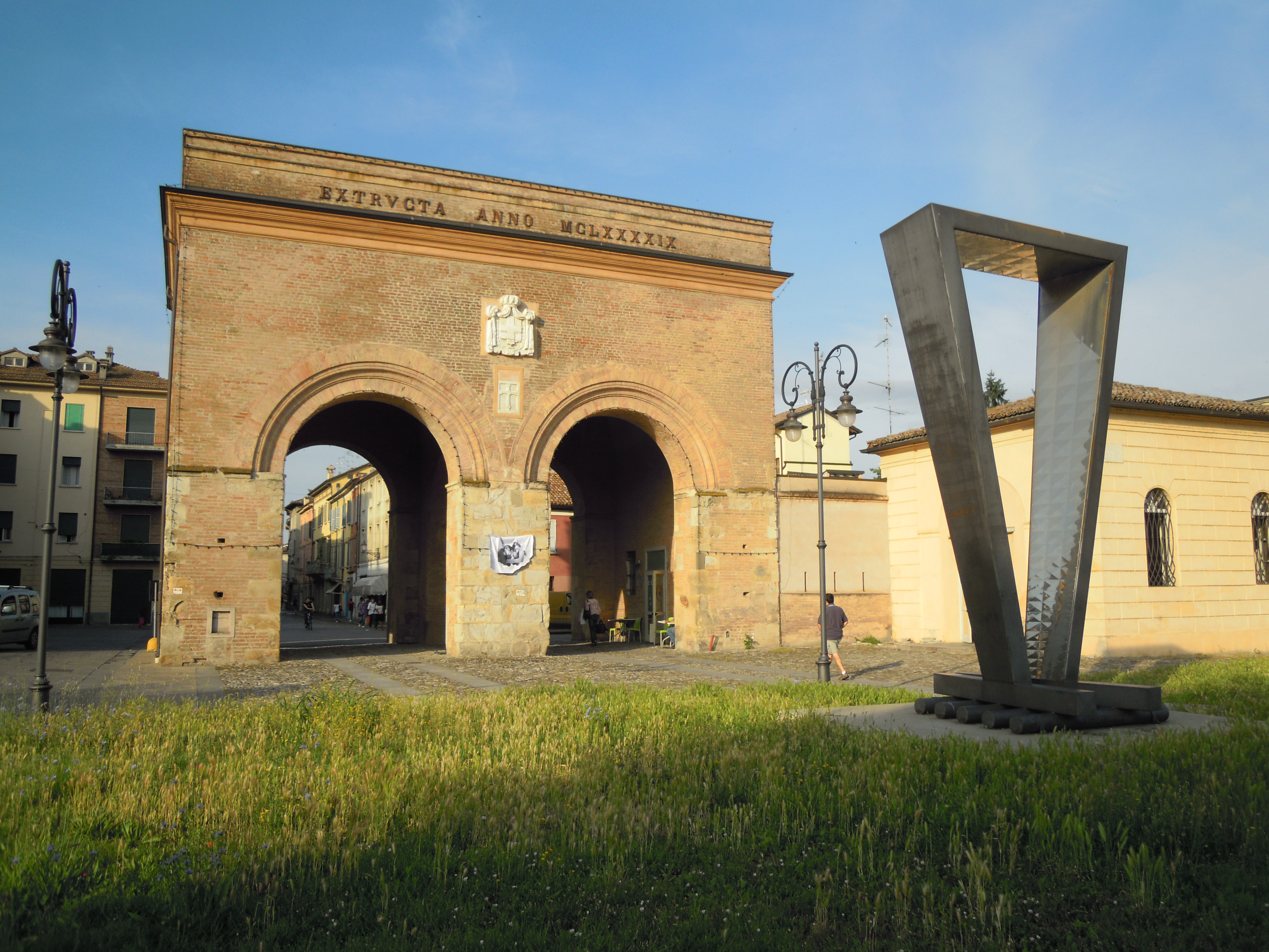 Reggio Emilia - Porta Santa Croce